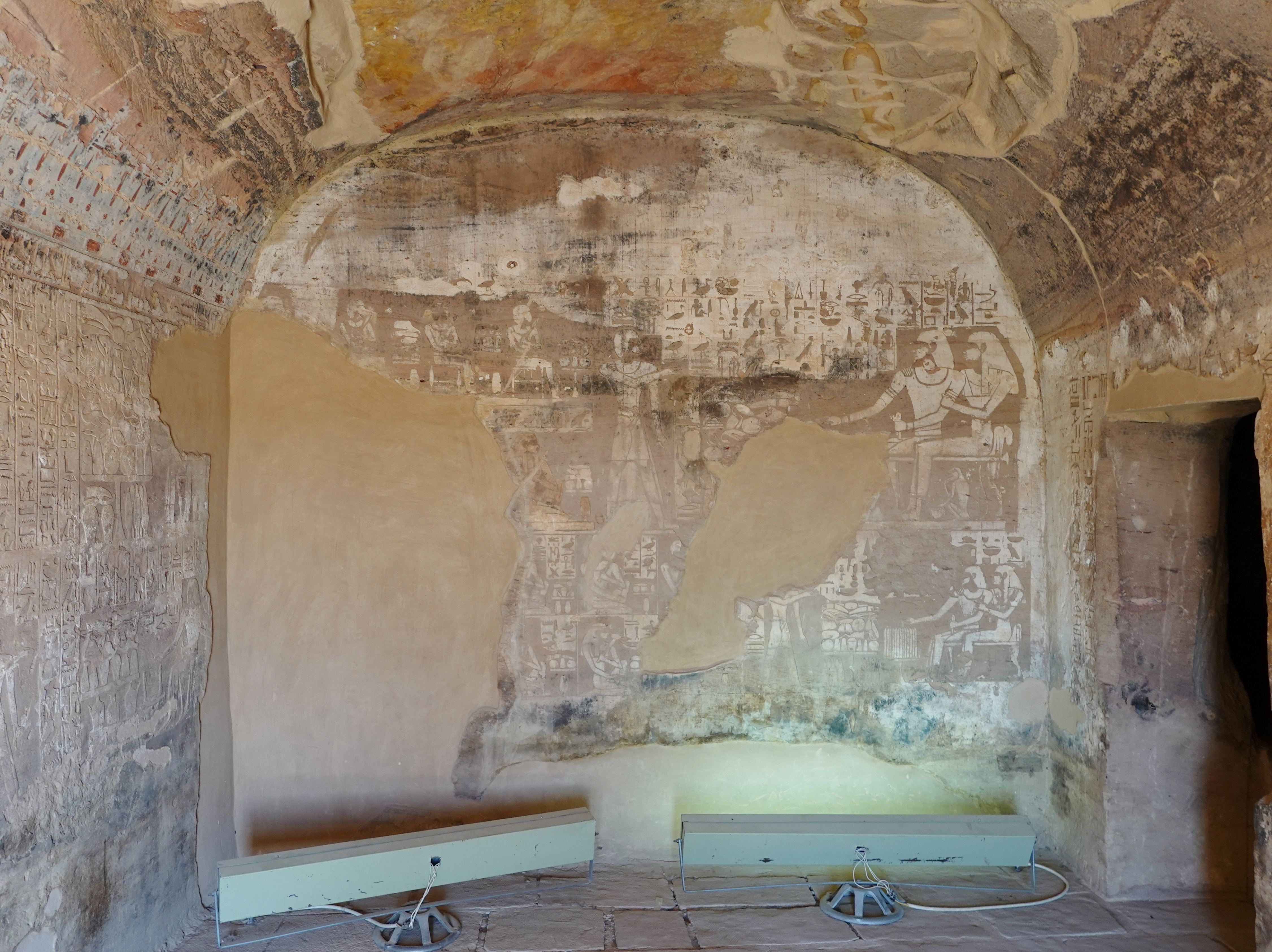 Felsengrab des Ahmose, Sohn von Ibana, unter den Felsengräbern des altägyptischen Necheb bei el-Kab, Ägypten